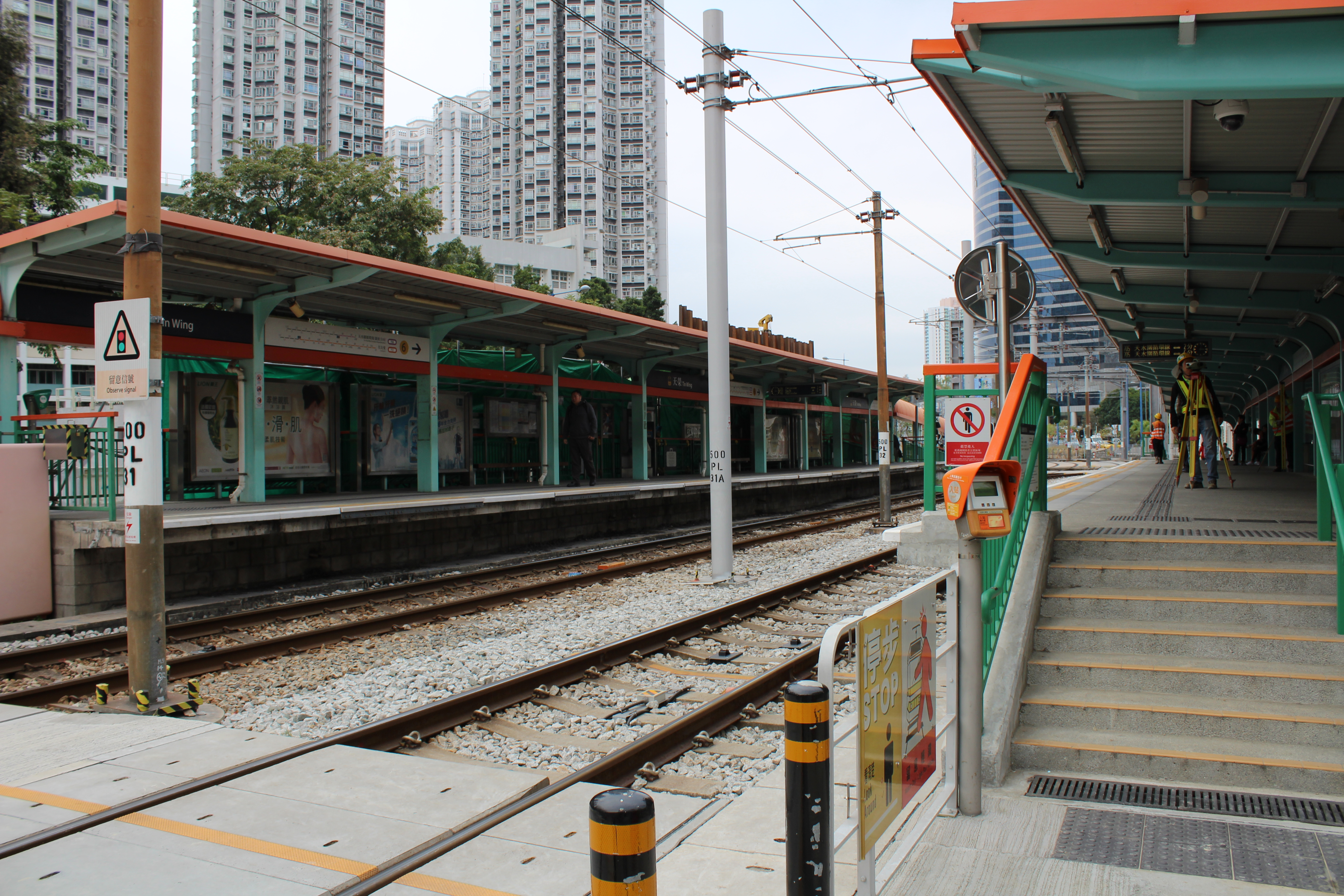 天榮站月台